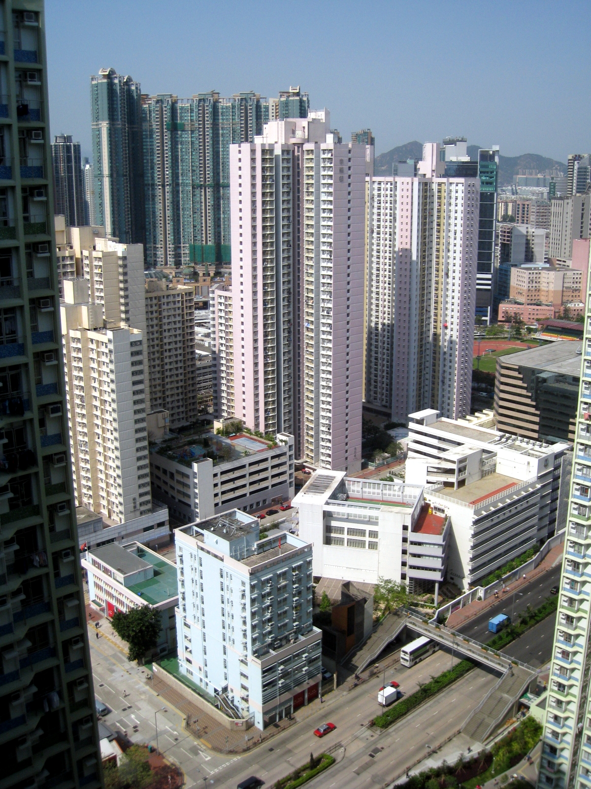 HK Fortune Estate 幸福邨